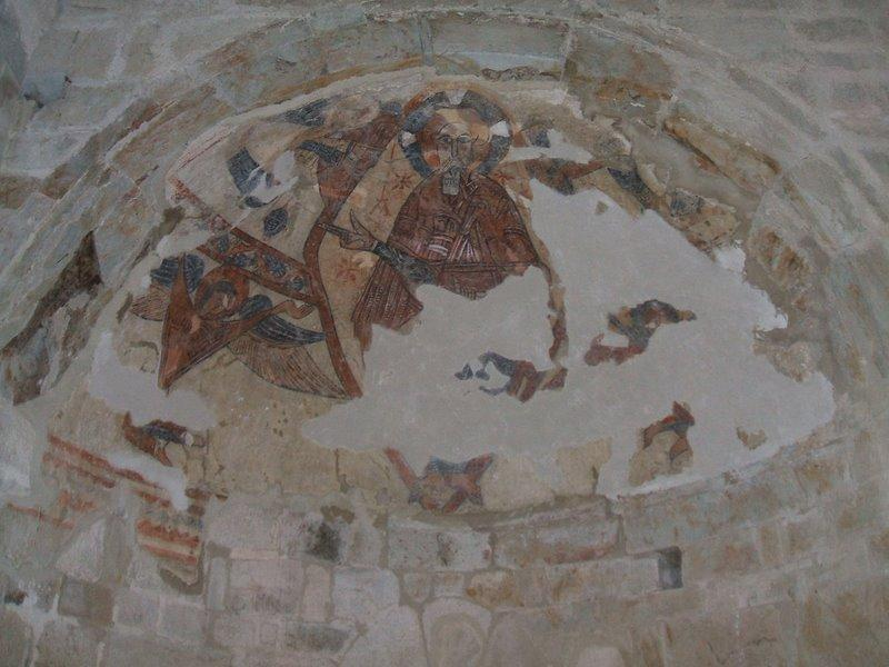 Prieuré de Marcevol (Pyrénées-Orientales, France) : fresque de l'absidiole méridionale (Christ en Majesté, XIIe siècle)